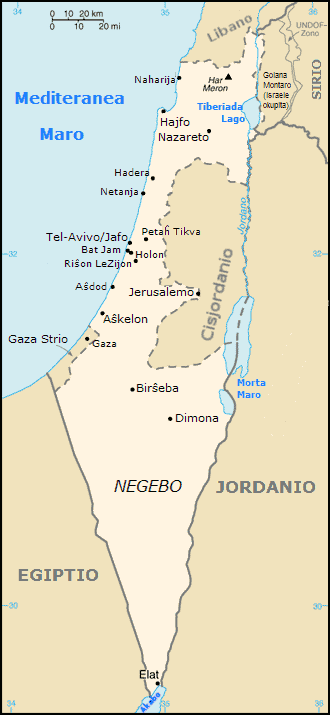 Mapo de Israelo (tradukita de la angla vikipedio) Adaptita de bildo el komunejo: :Dosiero:000_Israel_harta.PNG